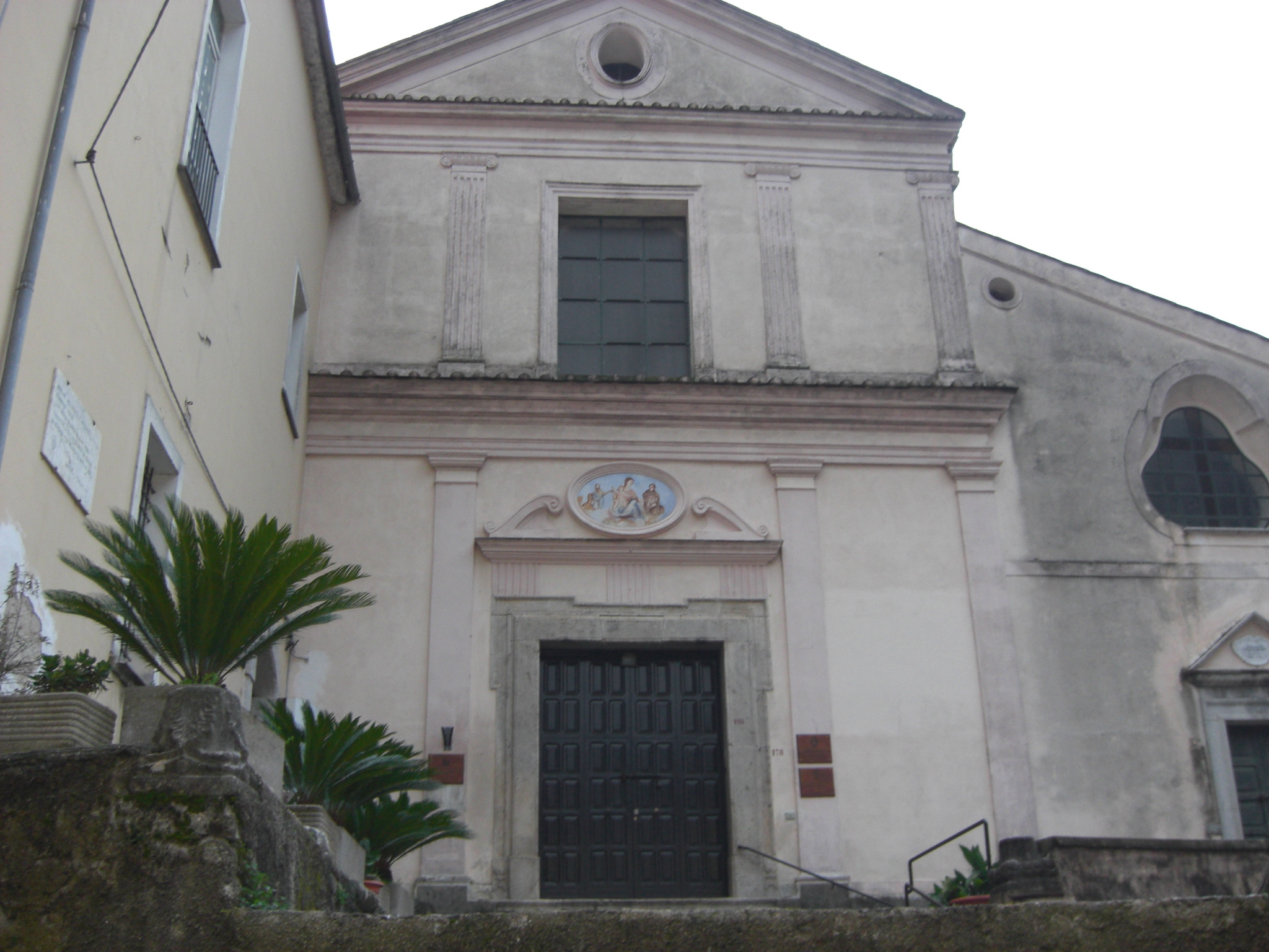 Chiesa di san Bartolomeo di Campagna